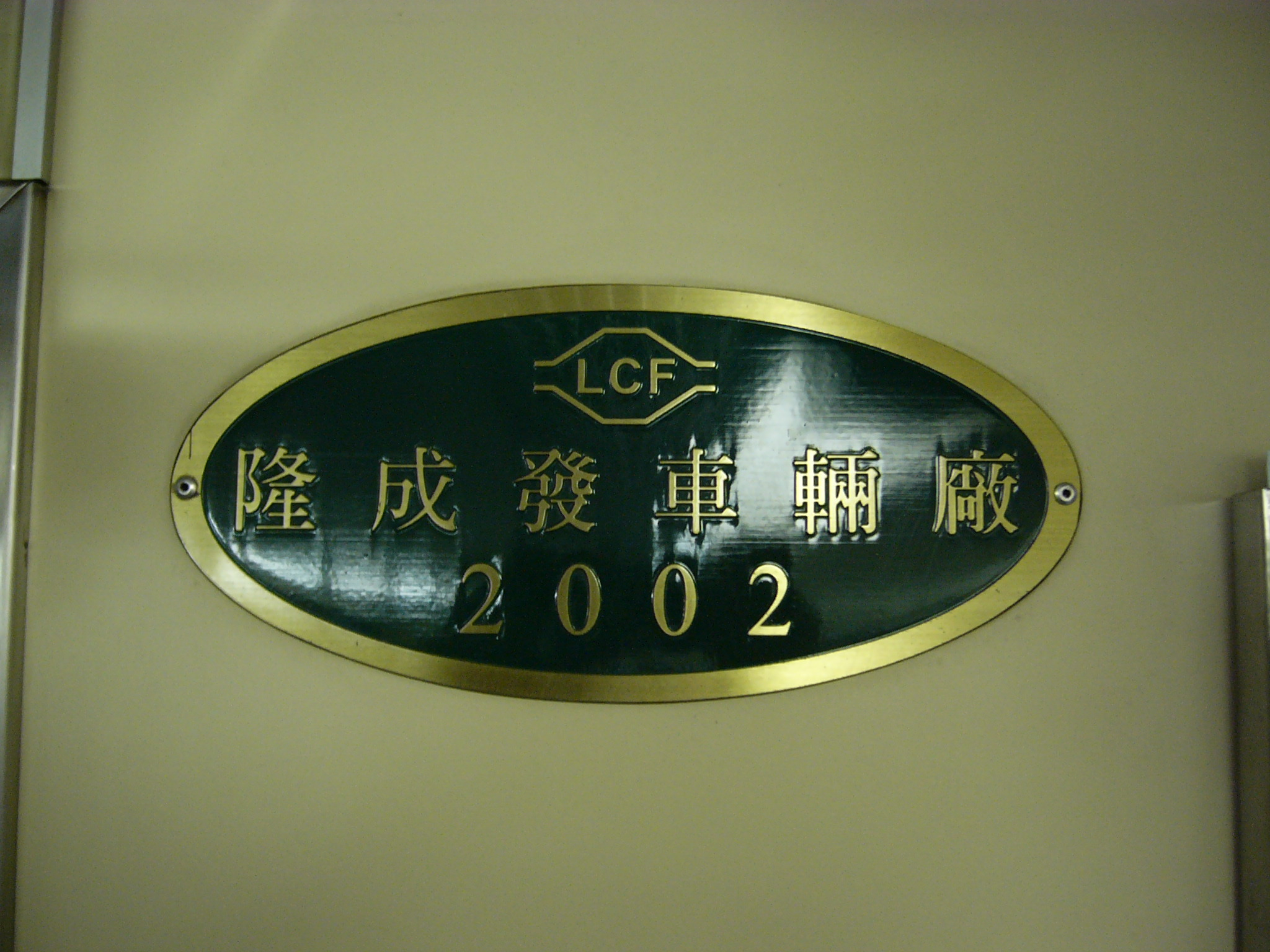 中文（台灣）: 臺灣鐵路管理局DR2800型柴聯車內，隆成發車輛廠銘板。